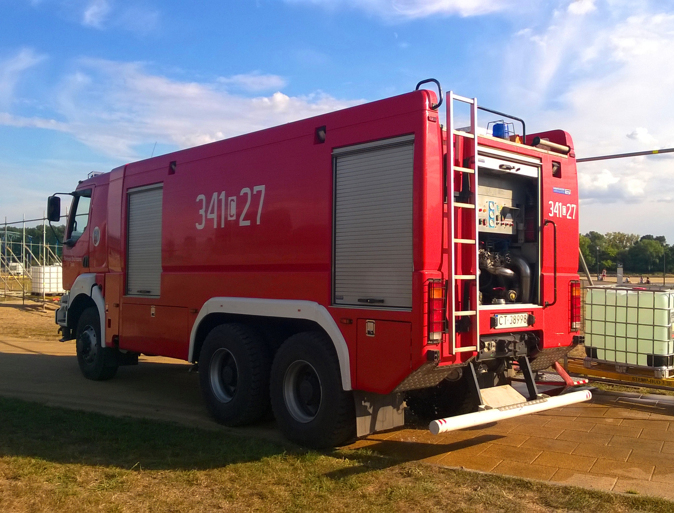 Pojazd straży pożarnej w Toruniu